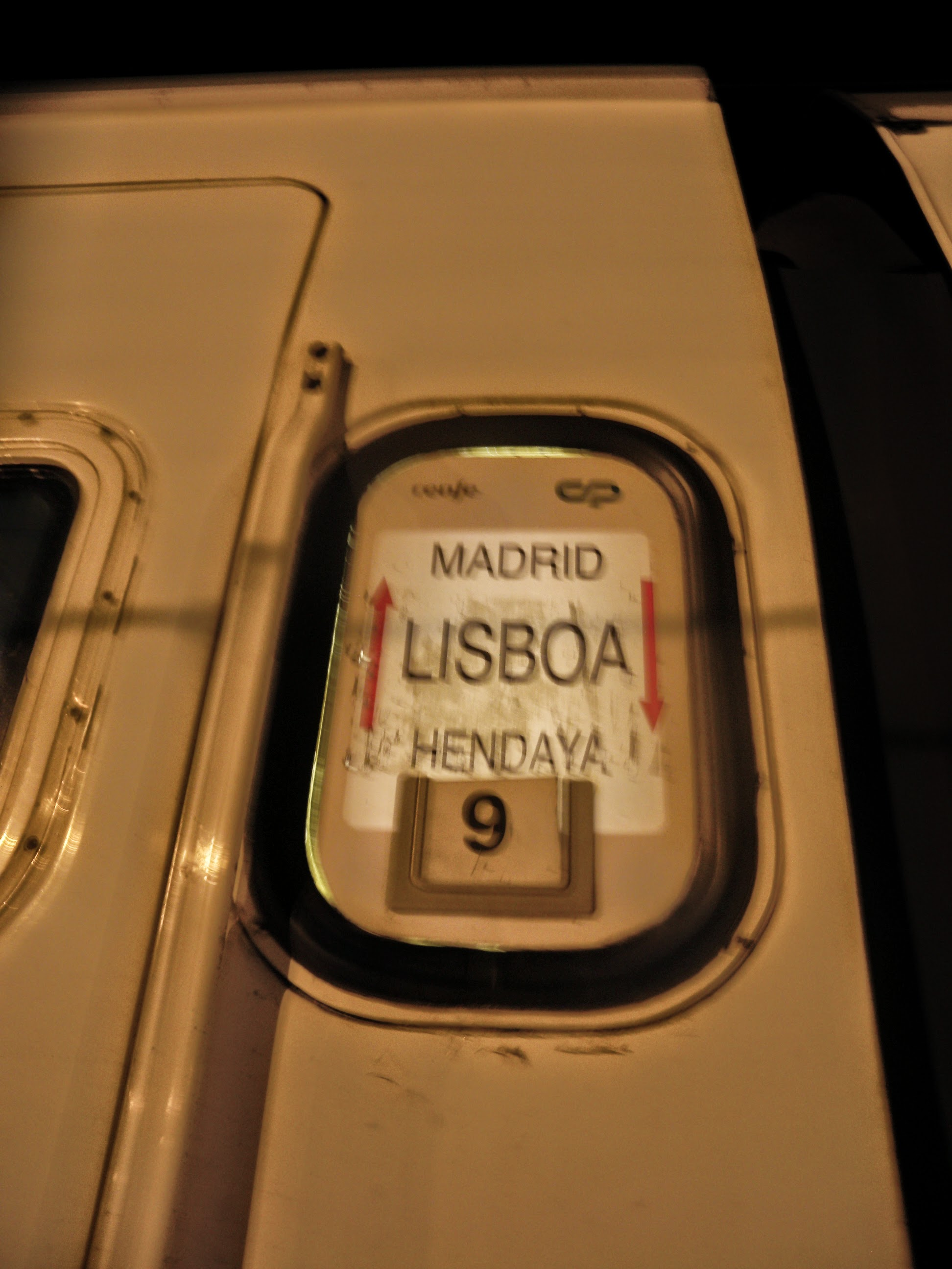 6355 Vilar Formoso, Portugal